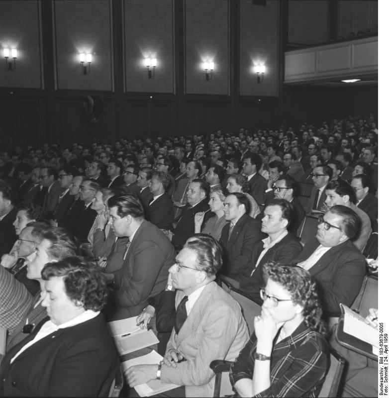 Zentralbild/Schmidt 24.4.1959 Autorenkonferenz des Mitteldeutschen Verlages in Bitterfeld Unter der Losung "Greif zur Feder Kumpel, die sozialistische Nationalkultur braucht dich" wurde am 24.4.1959 im Kulturpalast des EKB Bitterfeld eine Autorenkonferenz des Mitteldeutschen Verlages Halle eröffnet. An ihr nahmen fast 300 "schreibende Arbeiter" und etwa 150 Schriftsteller aus der DDR teil. UBz.: Blick in den Konferenzsaal während des Referates.